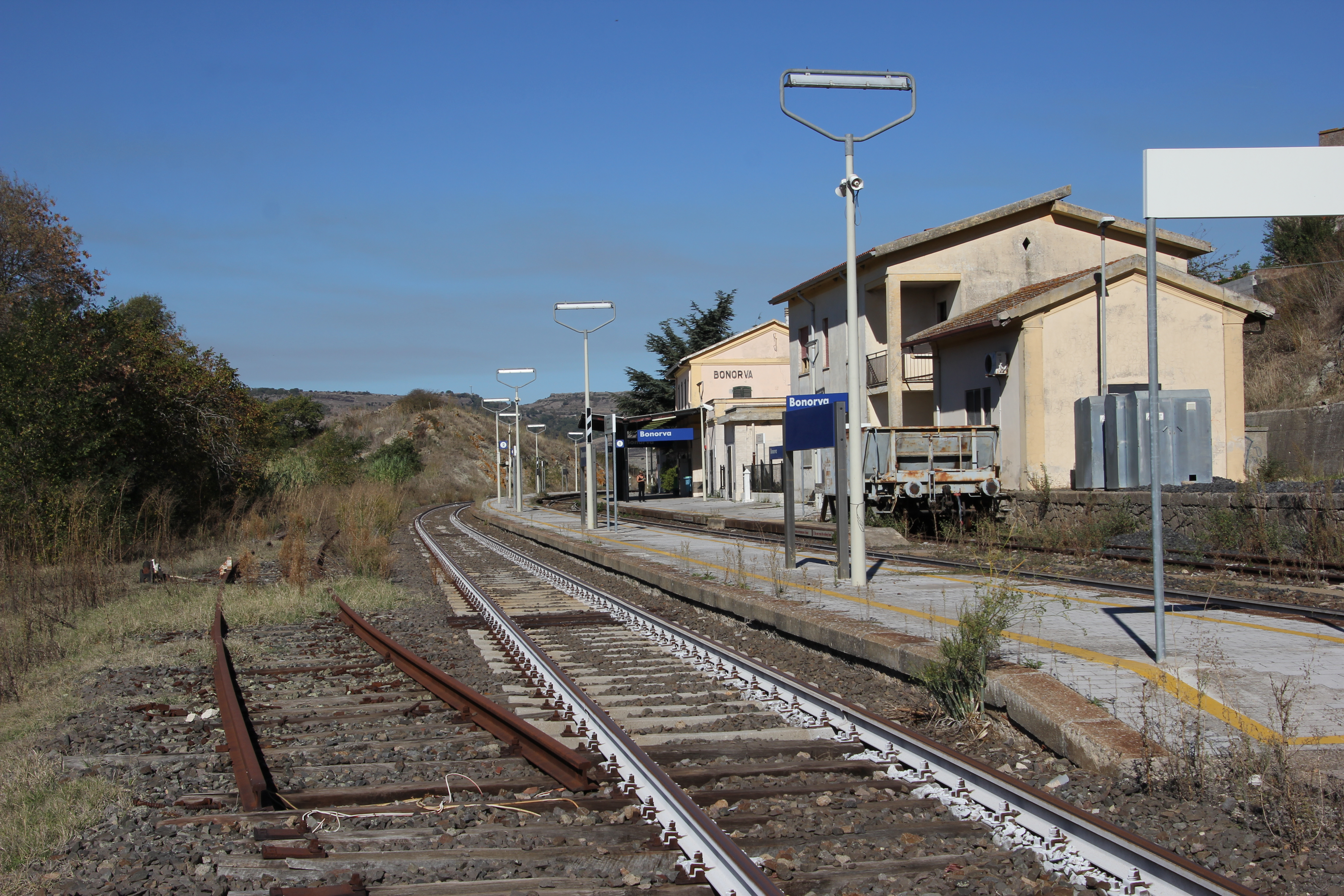 Bonorva, stazione ferroviaria